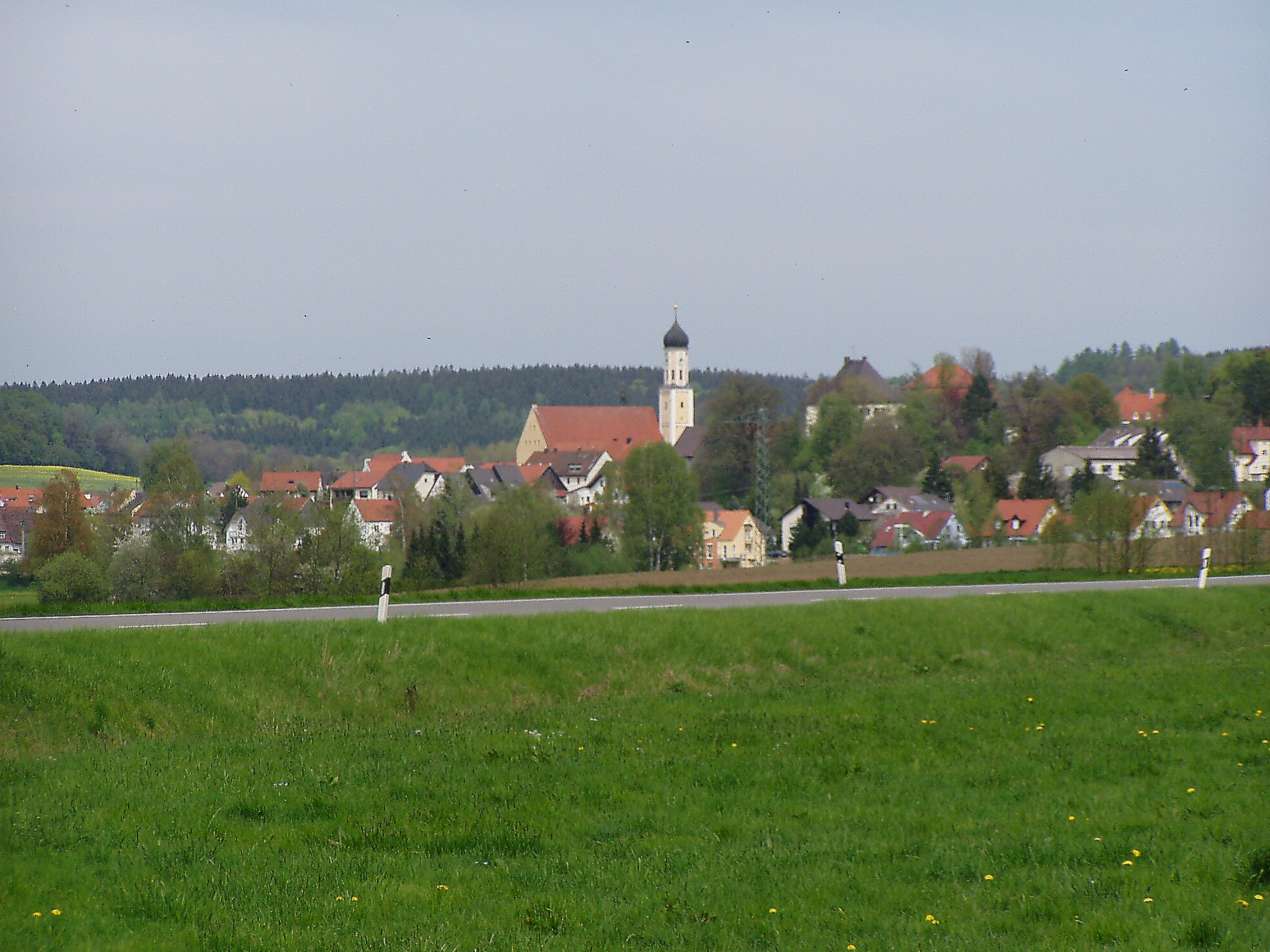 Zusmarshausen